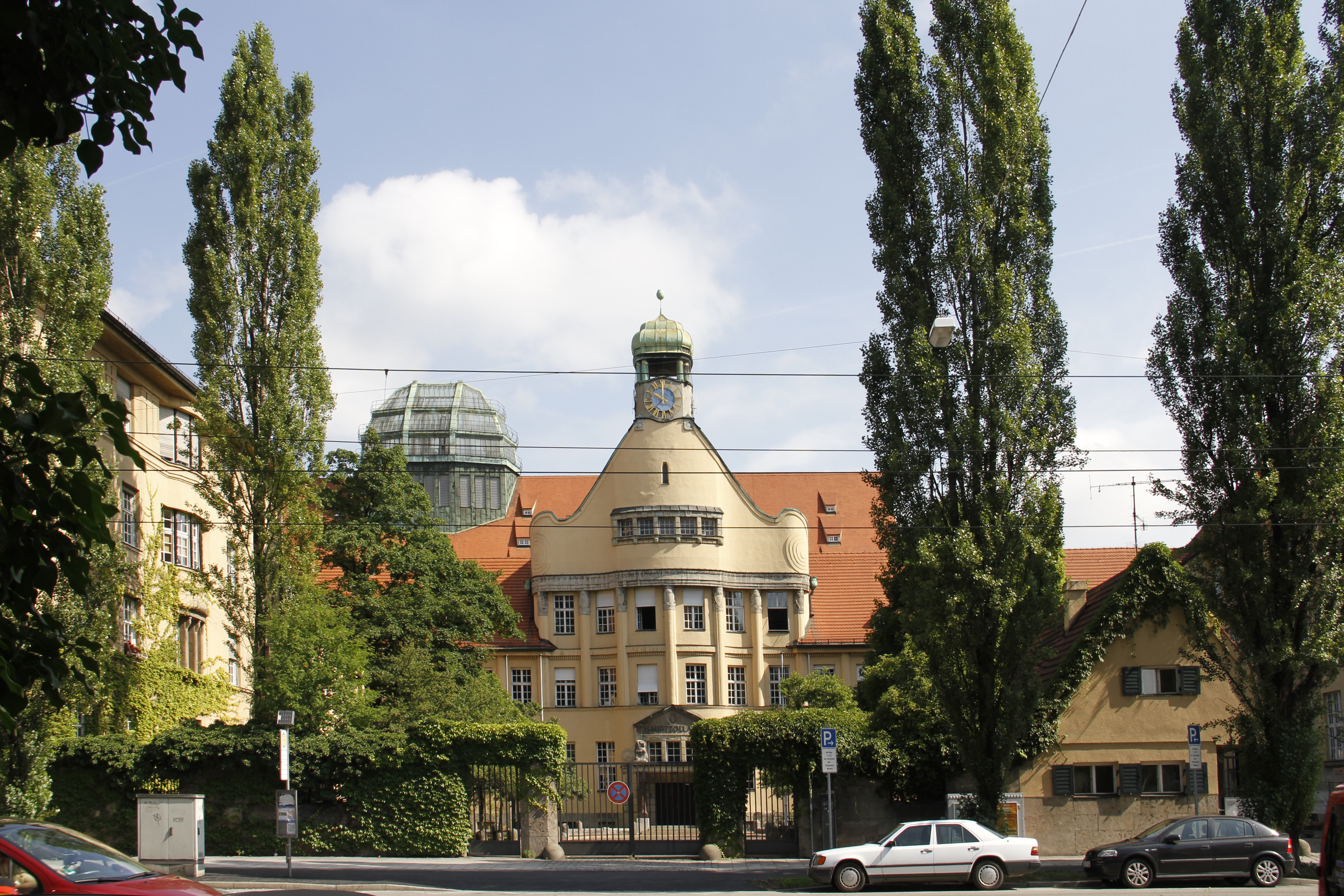 Hauptzollamt München. Ehrenhof und Verwaltungsgebäude, dahinter die Glaskuppel des Lagerhauses. Ansicht von Süden über die Landsberger Straße